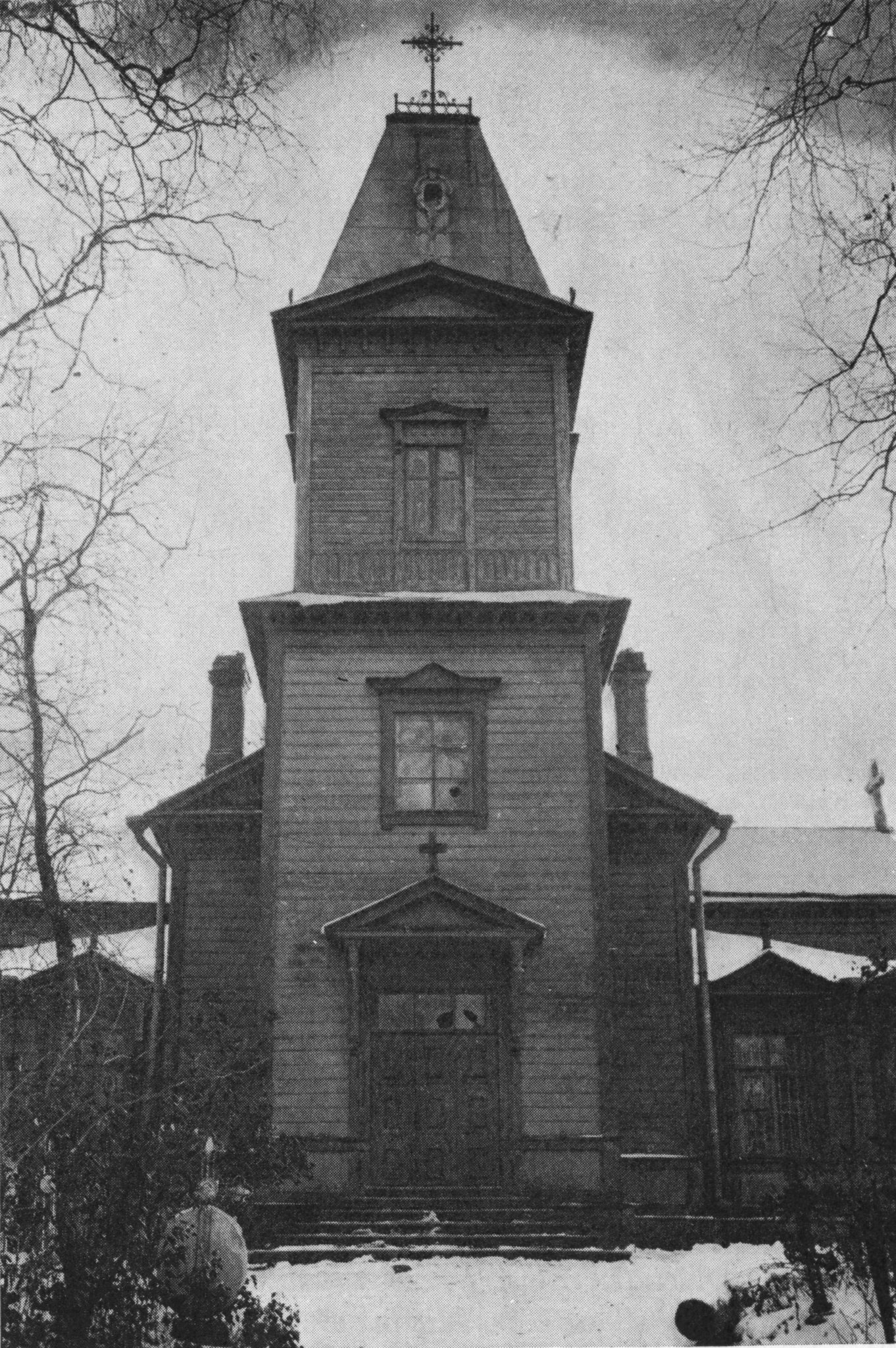 Кирха лютеранского прихода Хиетамяки.